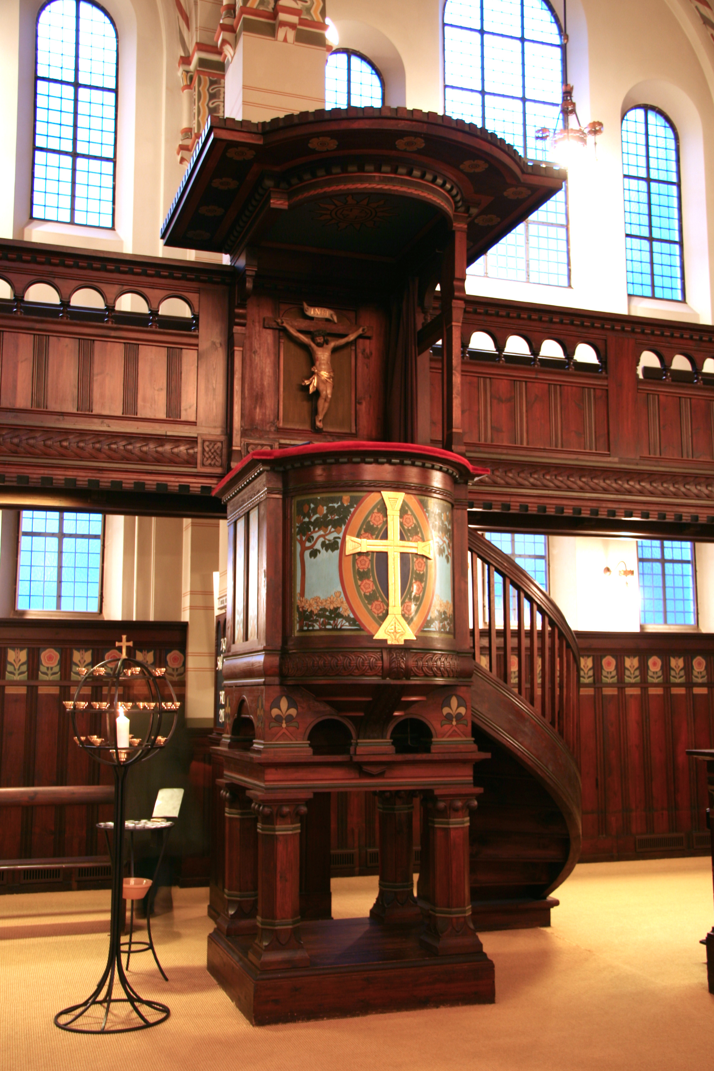 Kristkirken, Vesterbro, Copenhagen Denmark. Pulpit